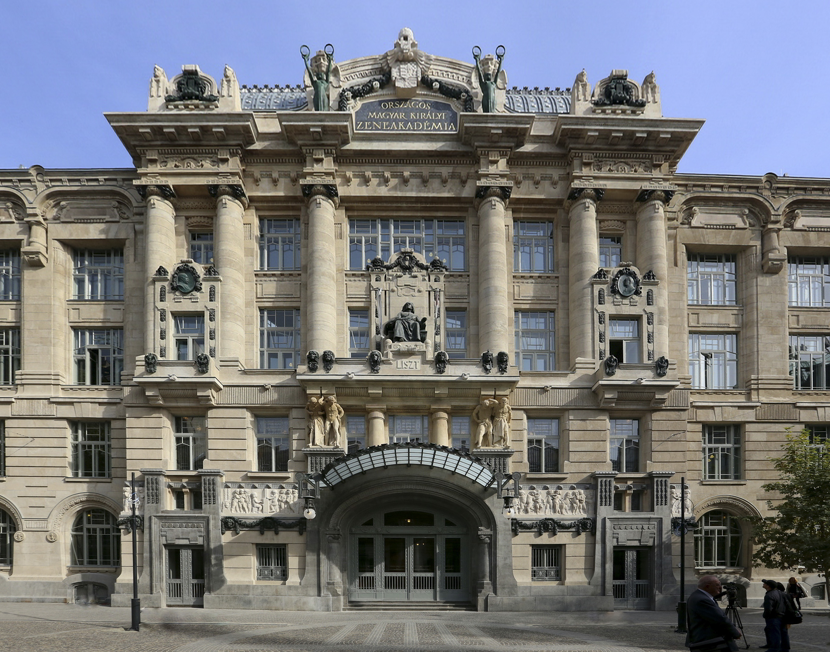 Liszt Ferenc Zeneművészeti Egyetem 2013-ban felújított homlokzata This is a photo of a monument in Hungary, Identifier: 755